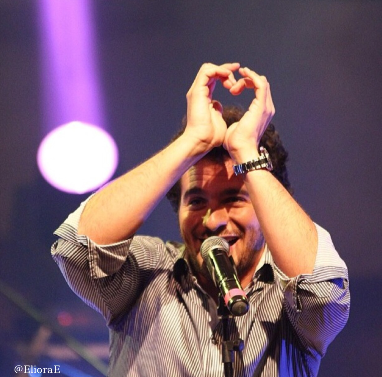 Amir chanteur